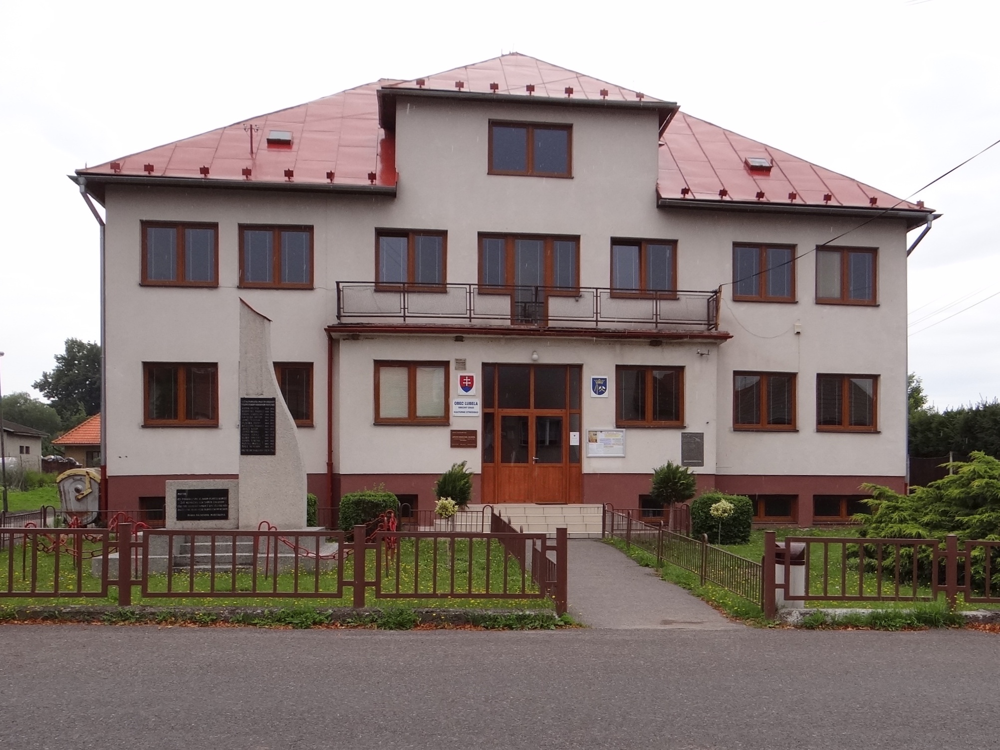 Ľubeľa